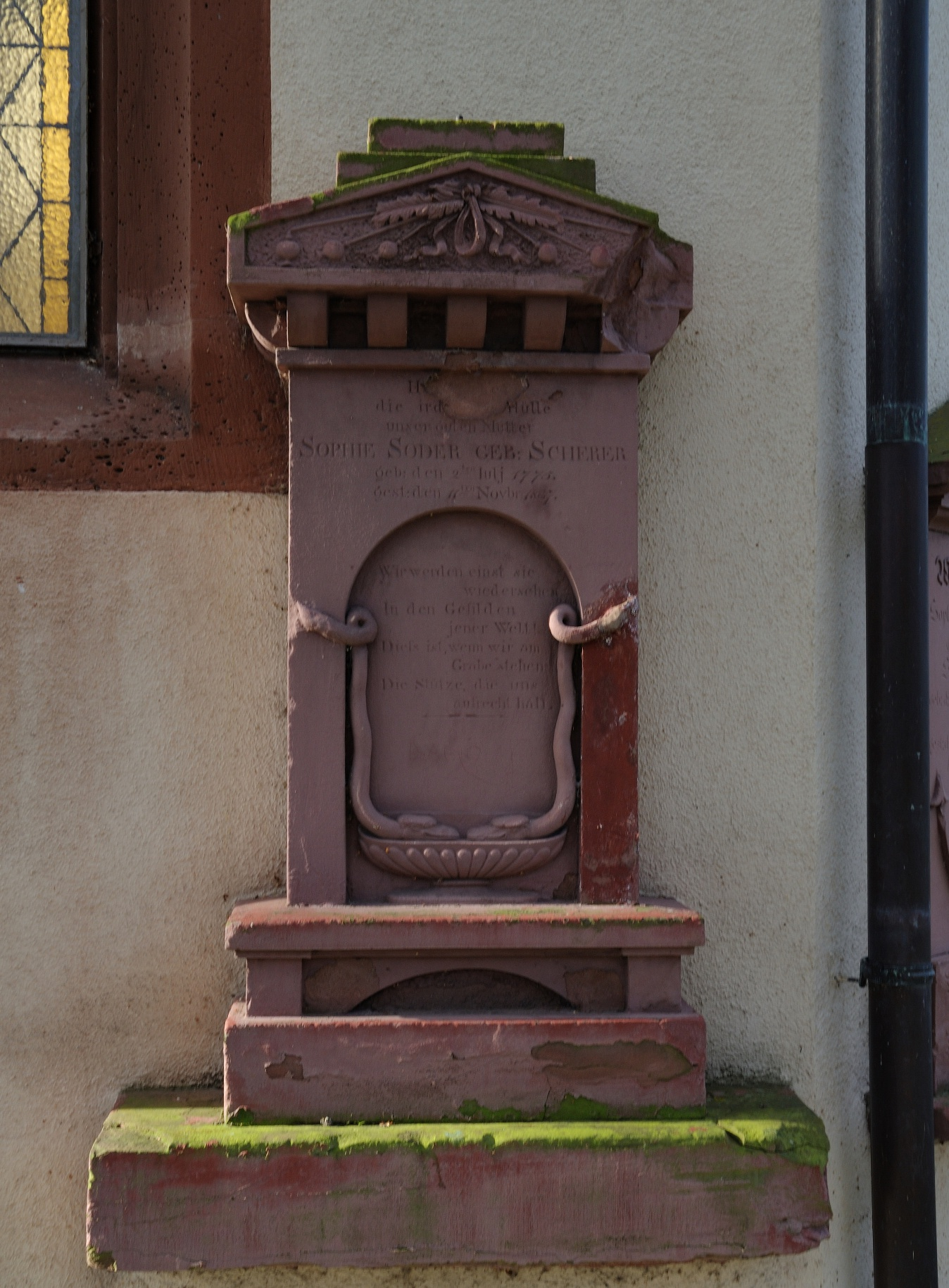 Weil am Rhein-Haltingen: St. Georg